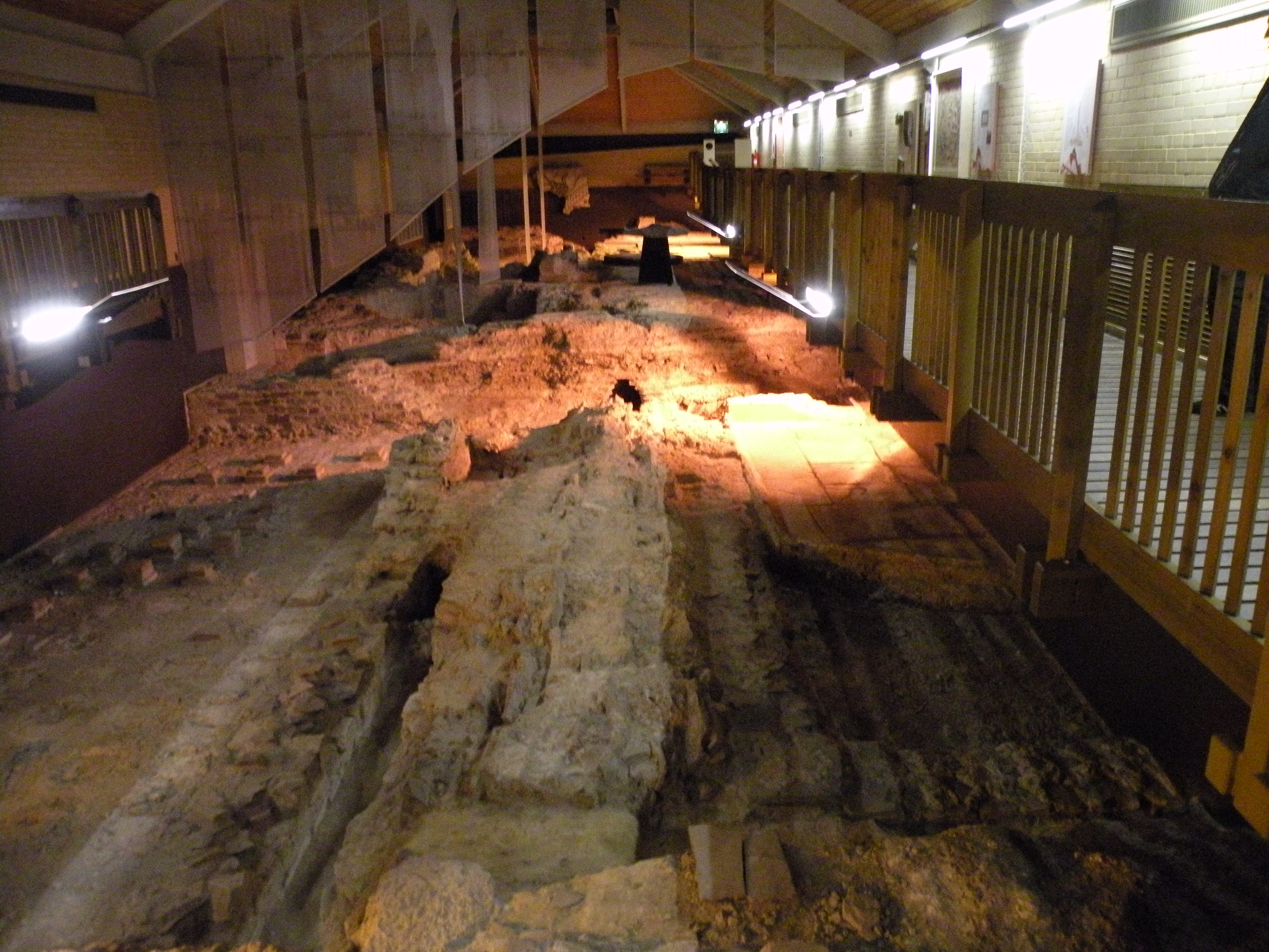 Basilique civile de caerleon, pays de galles